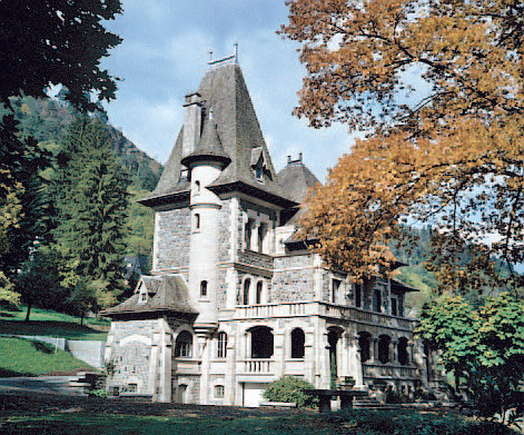 Château des années 30 Le Terrandou.